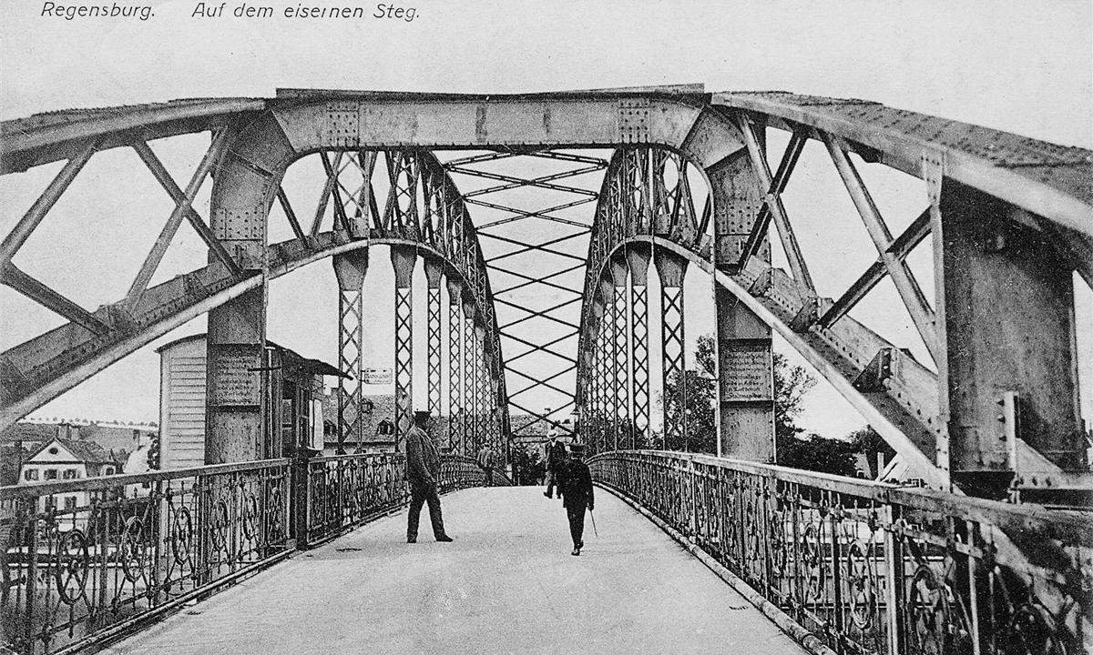 Ansichtskarte - Photo - schwarzweiß - "Regensburg - Auf dem Eisernernen Steg"